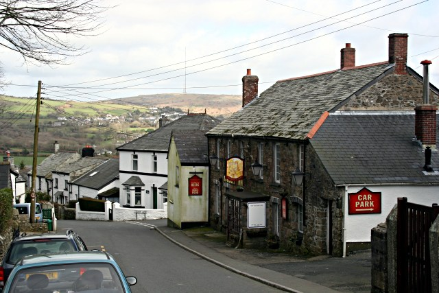 St Cleer